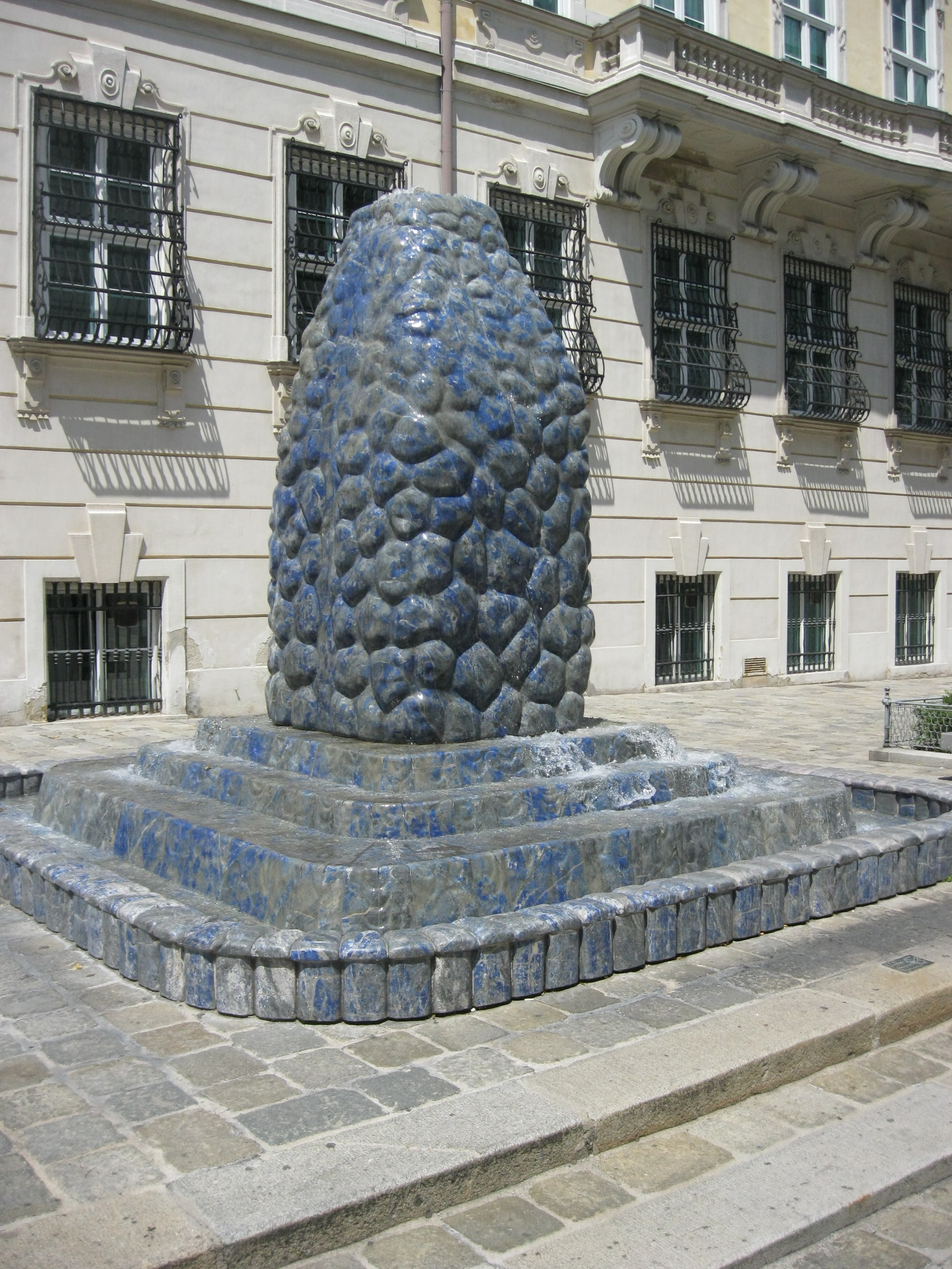 Bundeskanzleramt und Österr. Haus-, Hof- und Staatsarchiv